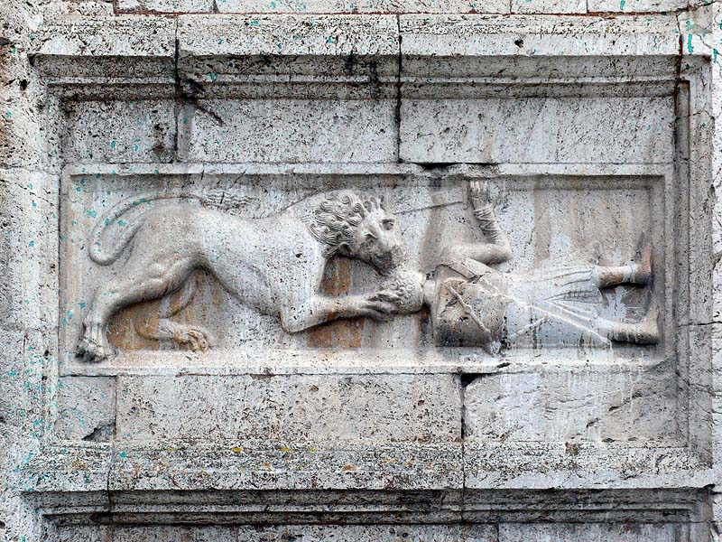 Spoleto: San Pietro church, facade - detail: lion and gladiator